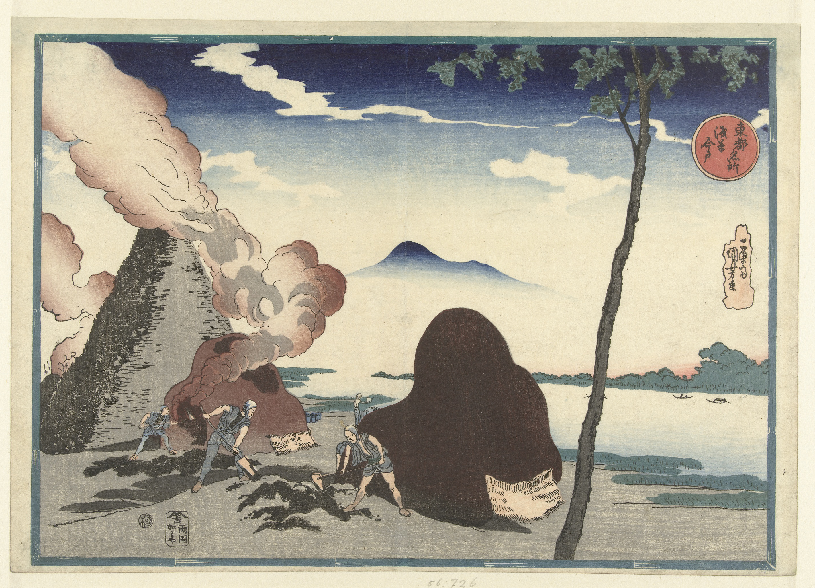 Mannen aan het werk bij tegelovens langs een rivier; op de achtergrond aan de rivieroever stapels afgebakken tegels. Voorstelling omsloten door groene rand van bamboestammen. Label Line: mentioned on object Utagawa Kuniyoshi (1798 - 1861), 1831 - 1835, kleurenhoutsnede; lijnblok in zwart met kleurblokken Collection: prenten; Japan (collectie)